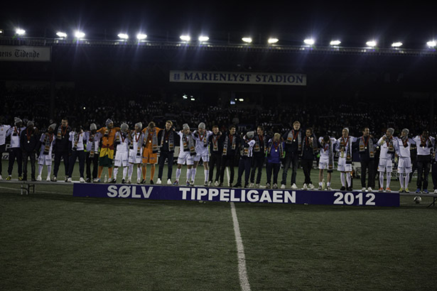 Sølvklubben 2012